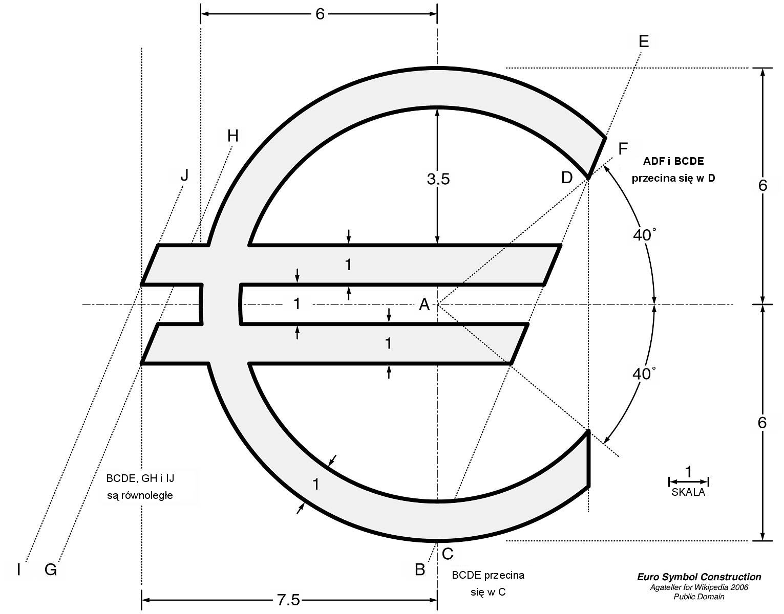 Wymiary symbolu EURO.